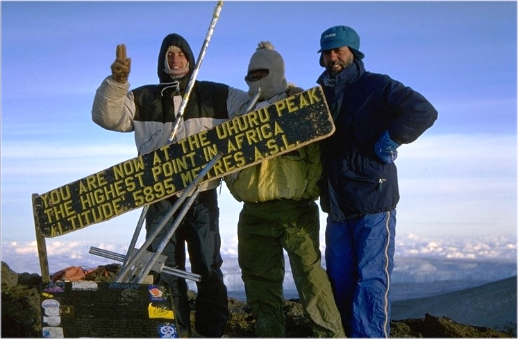 Uhuru Peak - 5.895 m Kilimanjaro National Park - Tanzania - 1996